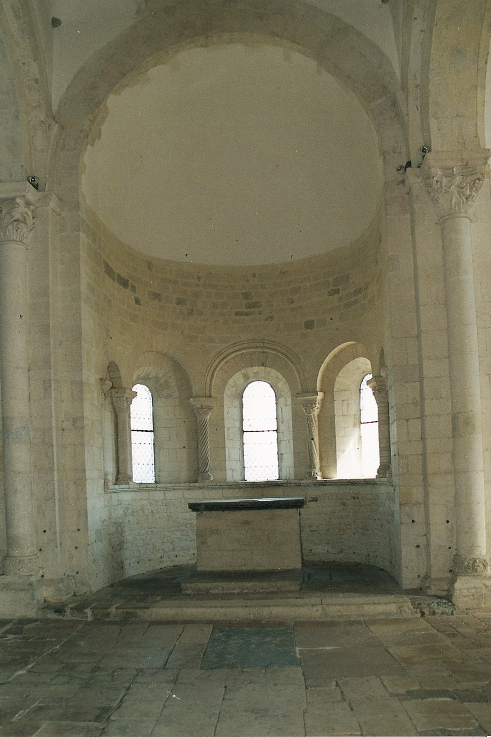 St.-André-de-Bâgé, Chorapsis